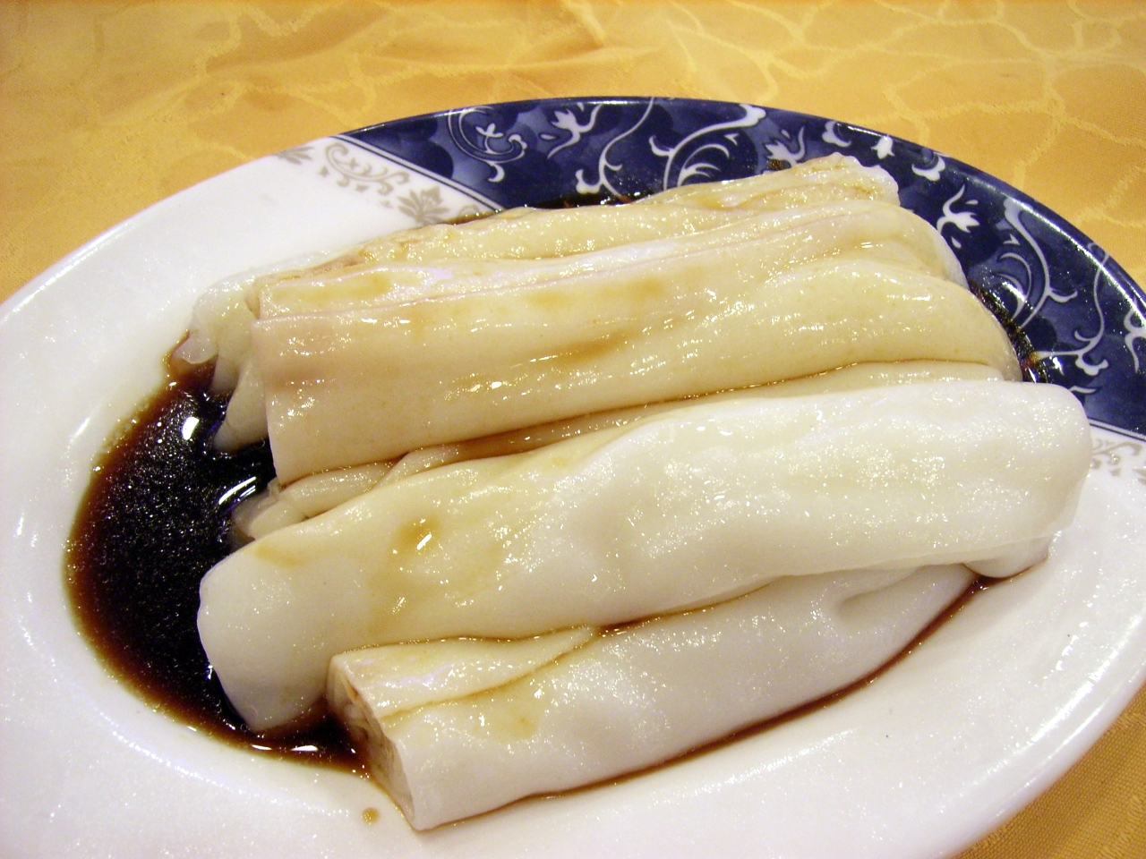 GuangDong food - 拉腸是一種使用米漿作成的廣東小吃，又稱布拉腸，腸粉，豬腸粉。